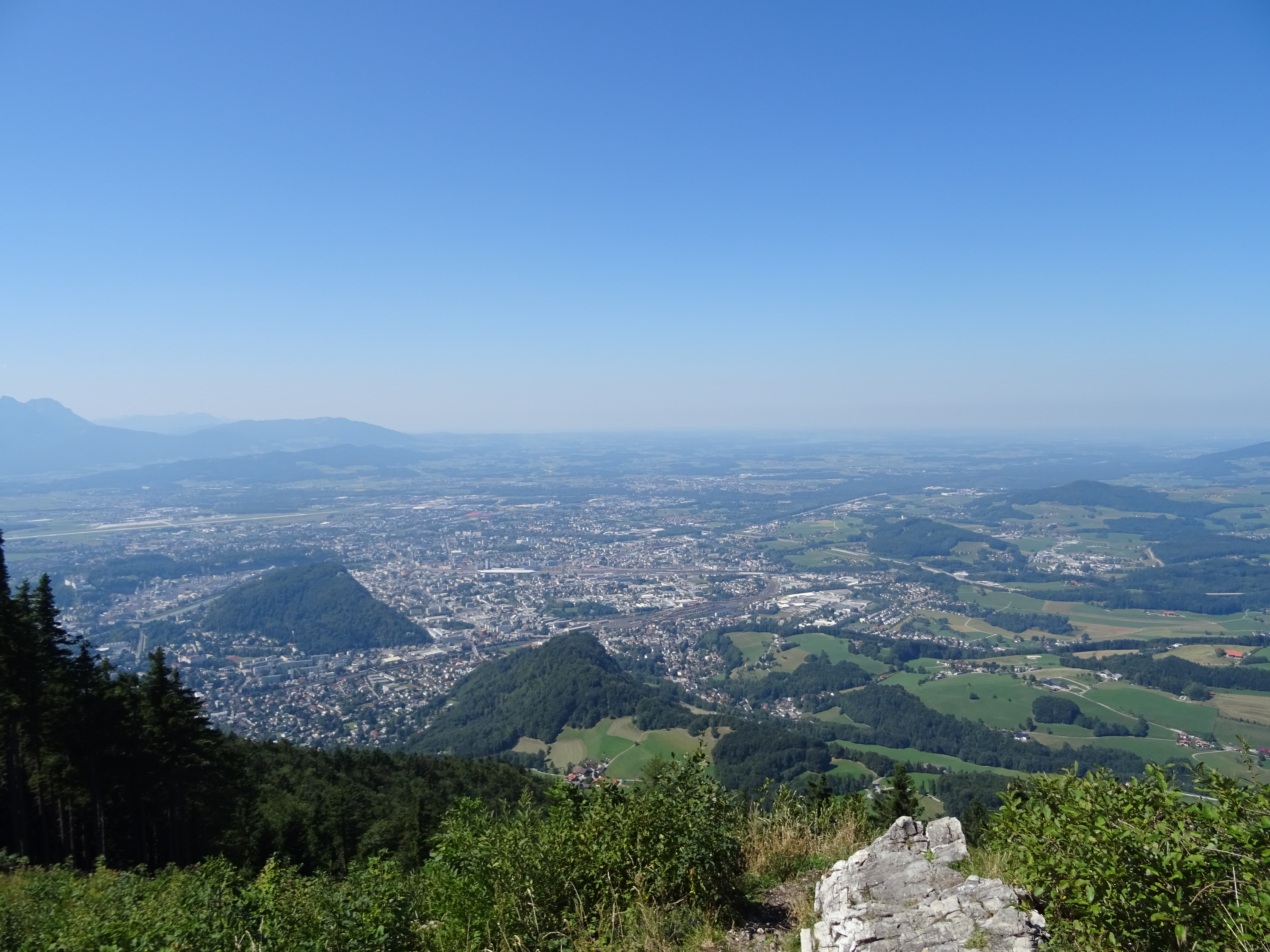 Ausblick vom Gaisberggipfel über die Stadt Salzburg und das nähere Umland.